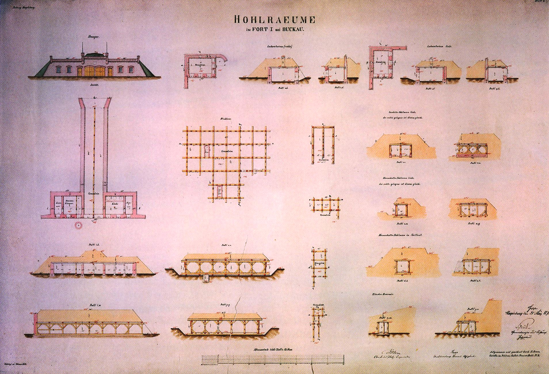 Zeichnung der Hohlräume des Fort I der Festung Magdeburg